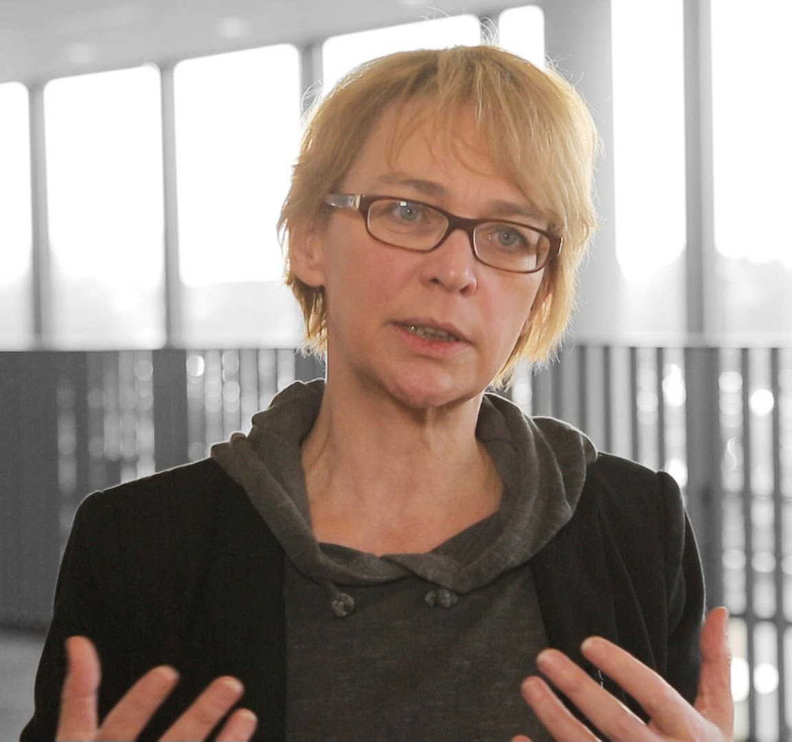 Computerspiele machen Spaß, oder? Dann darf man sie aber bitteschön nicht nutzen, um ernste Themen zu vermitteln, meinen viele. Dieses Paradoxon wurmt ...